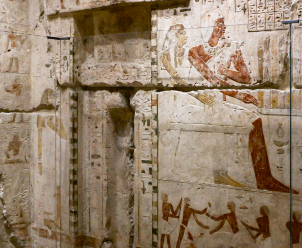 Scène de la chambre des offrandes/chapelle du mastaba Seshemnefer III.